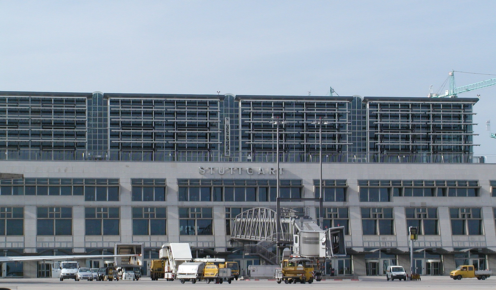 Der erste Blick auf den Stuttgarter Flughafen